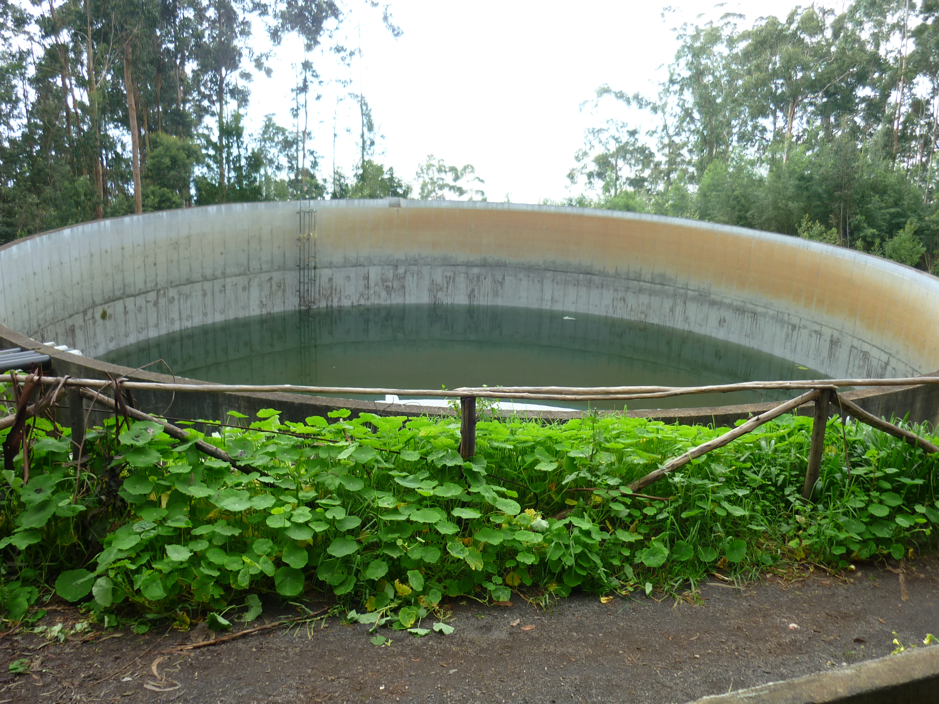 Víztározó a Levada dos Tornos alatt (Funchal, Madeira)